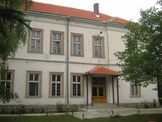 снимио лично Дамир С. Живковић